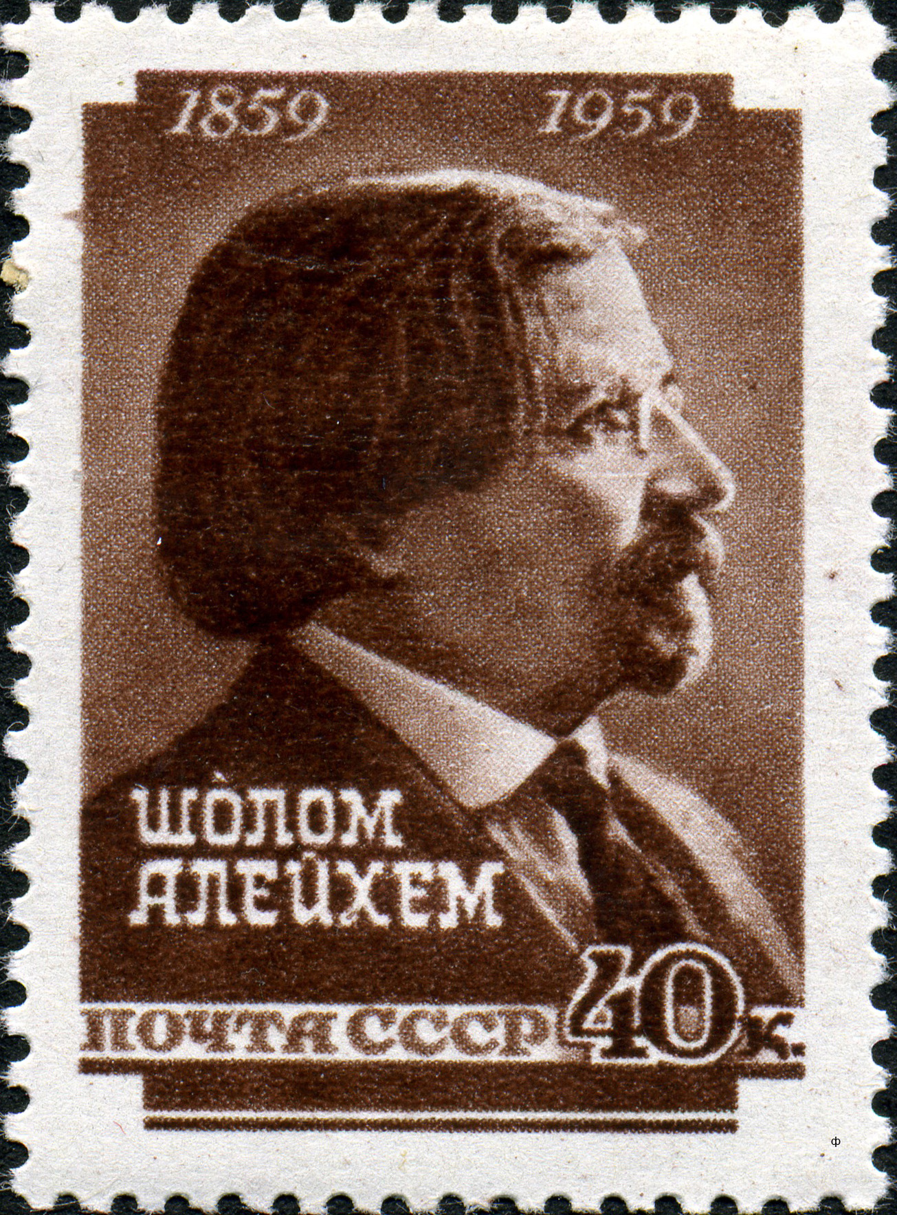 Марка СССР